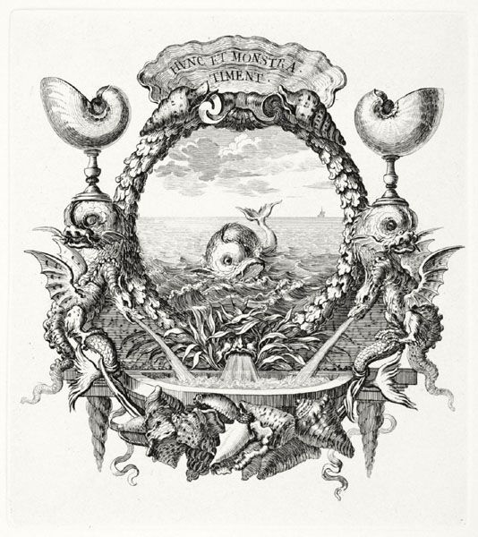 L’Eau : Hunc et monstra timent Graveur : Sébastien Le Clerc (1637-1714) France D'après l'œuvre de : Jacques Bailly (1629-1679) France Série : Devise des tapisseries du Roy, les Quatre éléments. Série en 16 planches. Provenance : Cabinet du Roi Technique : Eau-forte et burin Dimension de la feuille de papier : H. 33 L. 25 cm Dimension du cuivre : H. 25,6 L. 18,9 cm